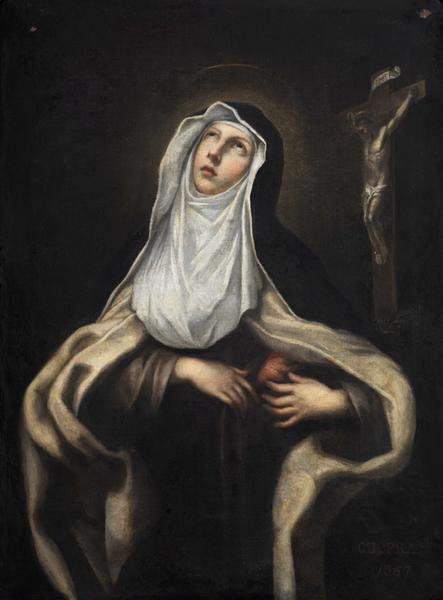 Santa Teresa ofreciendo su corazón, firmado "Guerra pinxit 1667". Óleo sobre lienzo, 69 x 93 cm, Perpignan, Musée Rigaud.